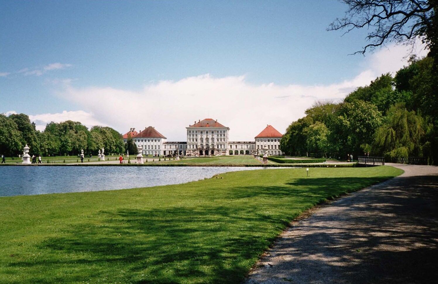 Schloss Nymphenburg, München. Nymphenburg Palace, Munich, Bavaria.